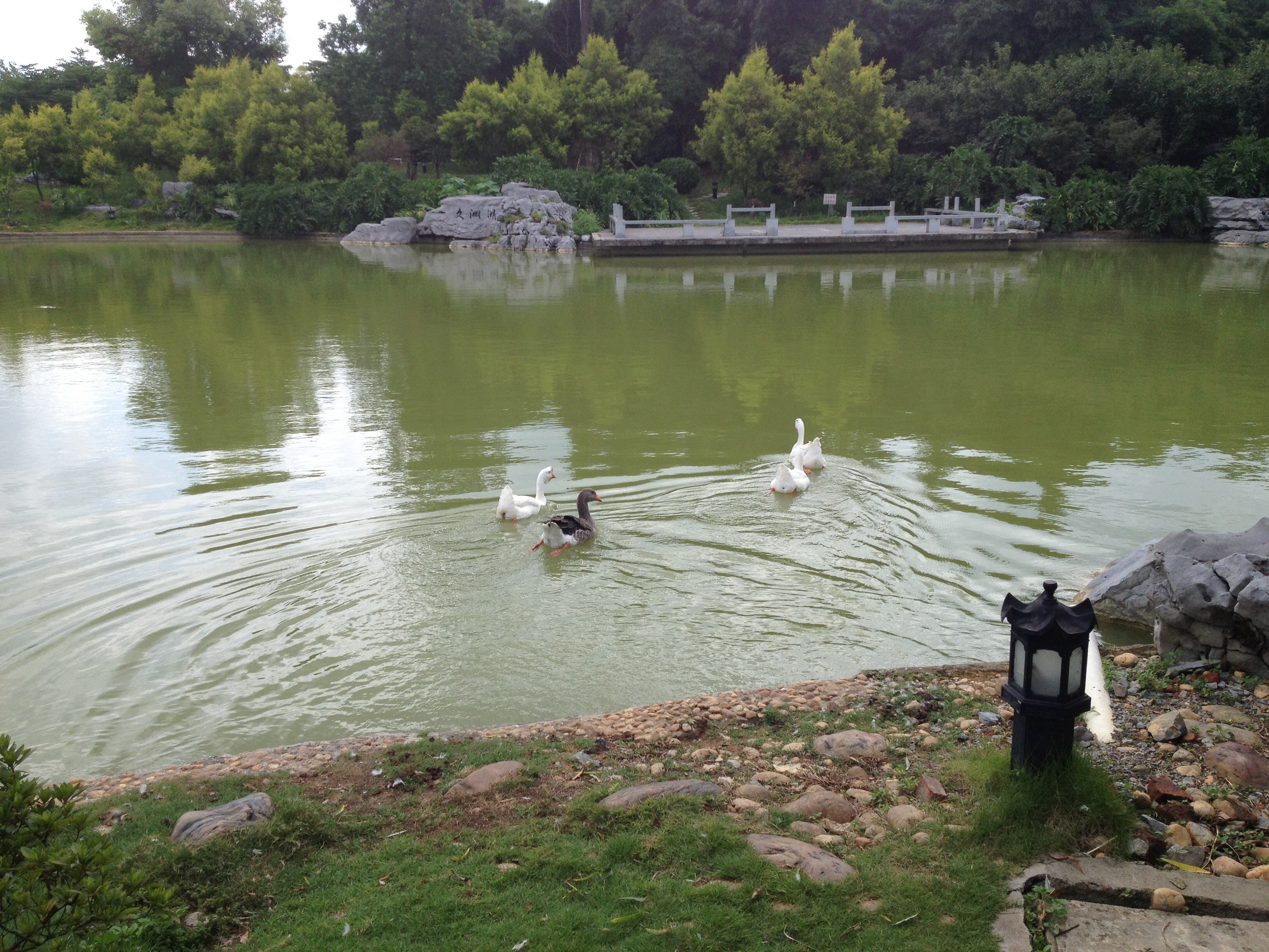 中文（中国大陆）: 广西柳州高级中学校内的人工湖。